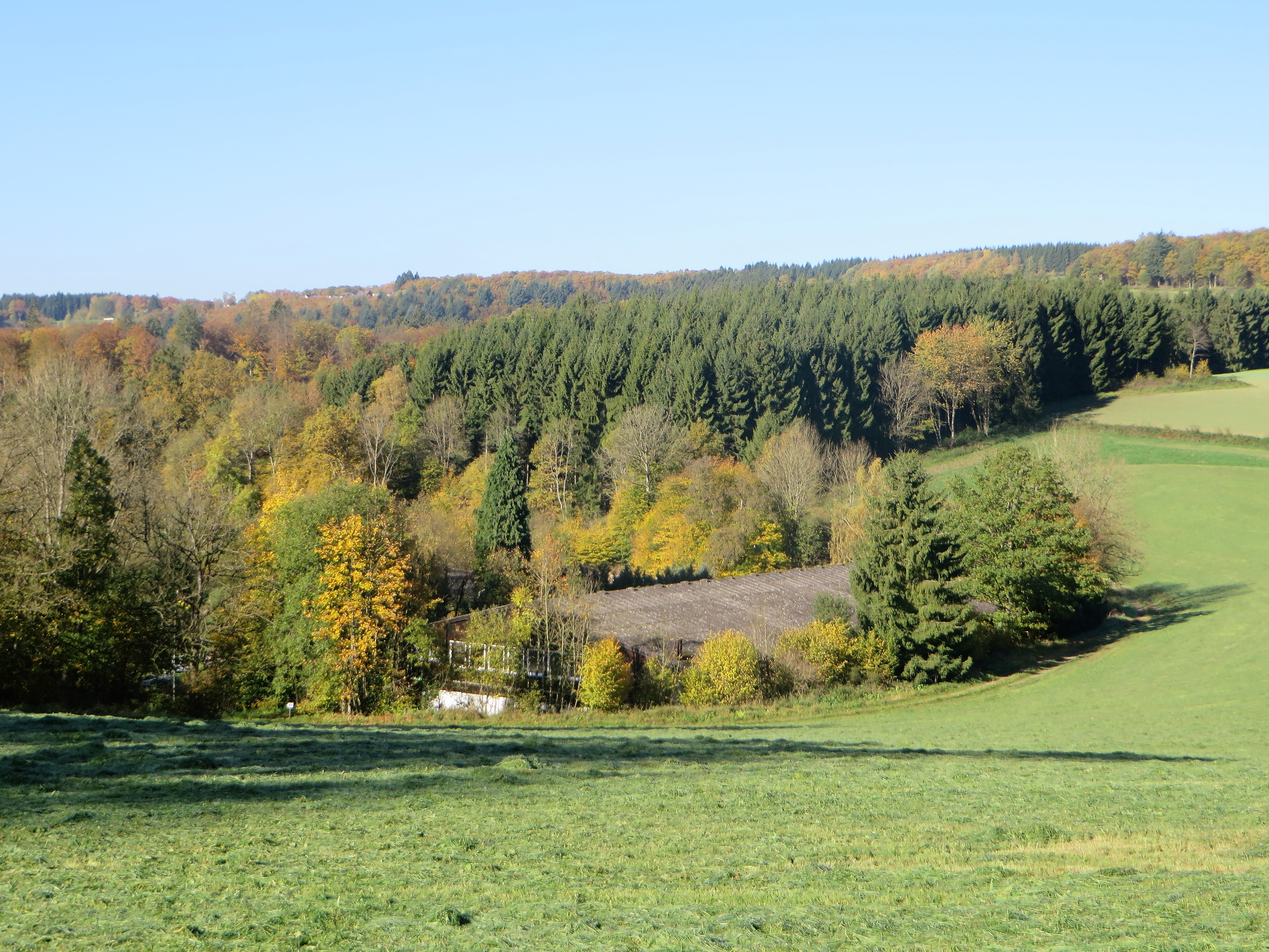 Blick auf Gut Dahlhausen bei Attendorn, zwischen Biekhofen im Süden und Windhausen im Norden. Am Horizont das Ebbegebirge. Das Gut liegt romantisch schön in einer Mulde, umgeben von Tannen-, Eichen- und Buchenwäldern. Es ist auf dem Foto nur das Dach der ehemaligen großen Reithalle zu sehen.